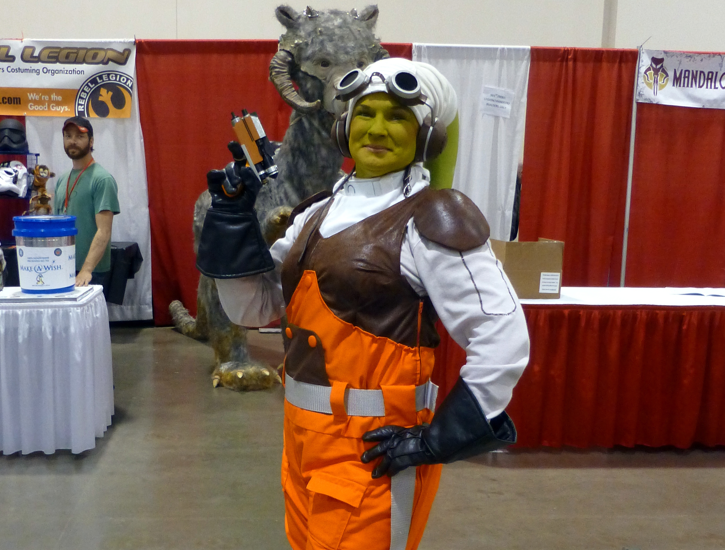 Hera Syndulla cropped